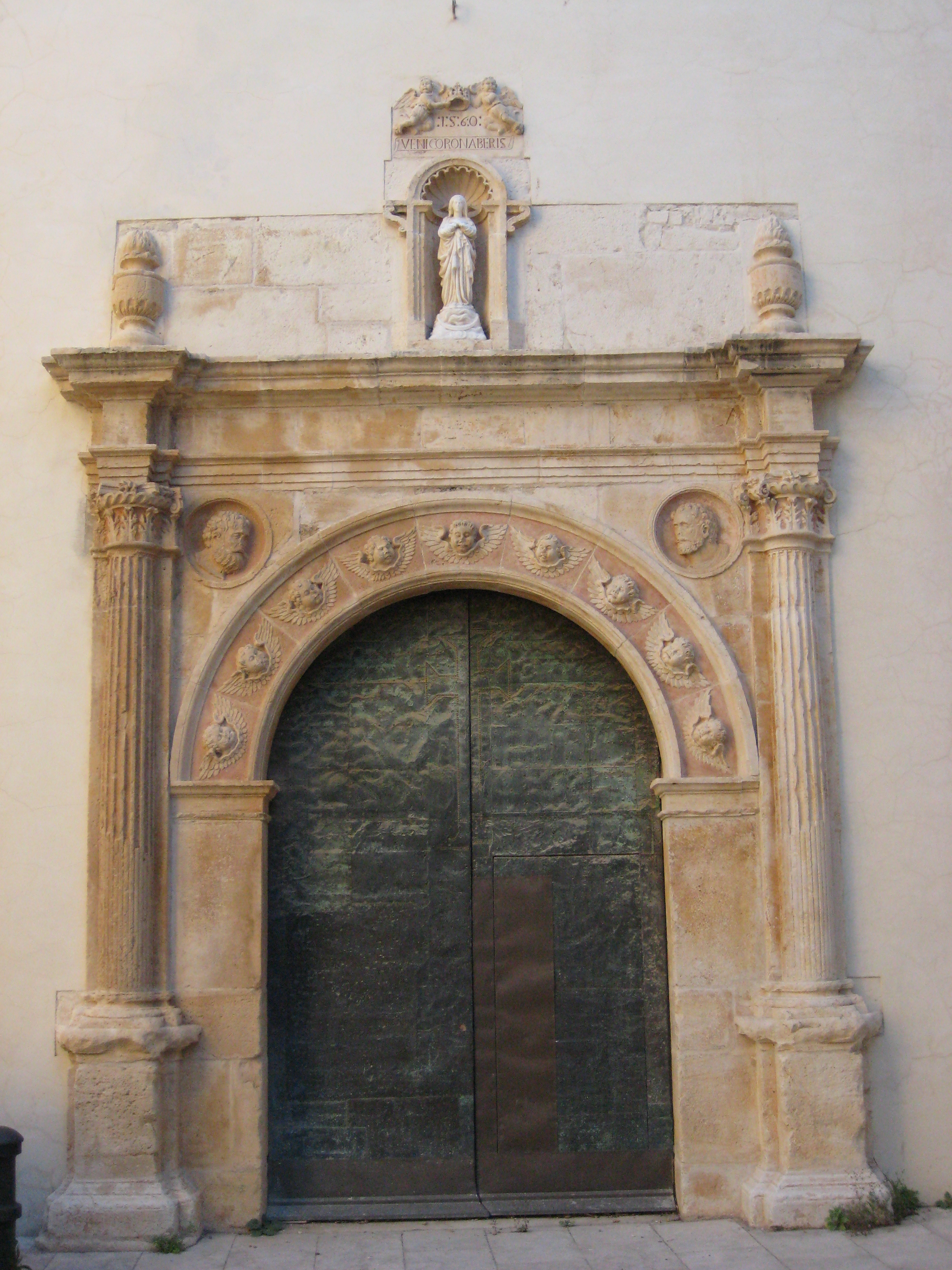 Portada lateral plateresca de l'Església de la Mare de Déu de l'Assumpció de Vinaròs (Baix Maestrat)